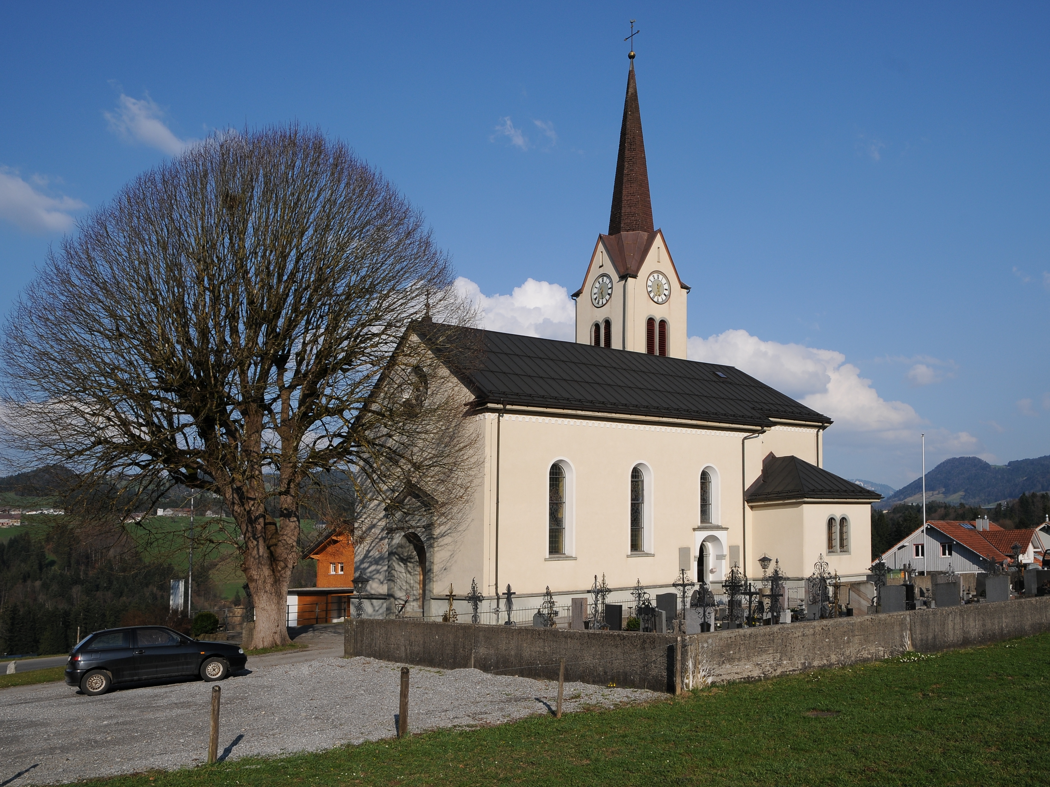 Expositurkirche: Herz Jesu und Mariae in Müselbach, (Alberschwende).